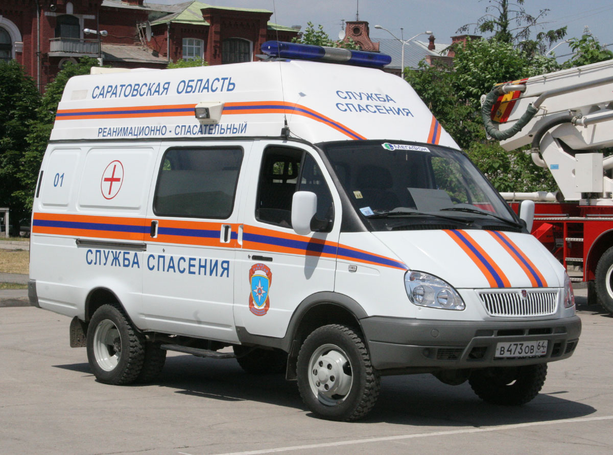 Автомобиль газель МЧС России. Саратов